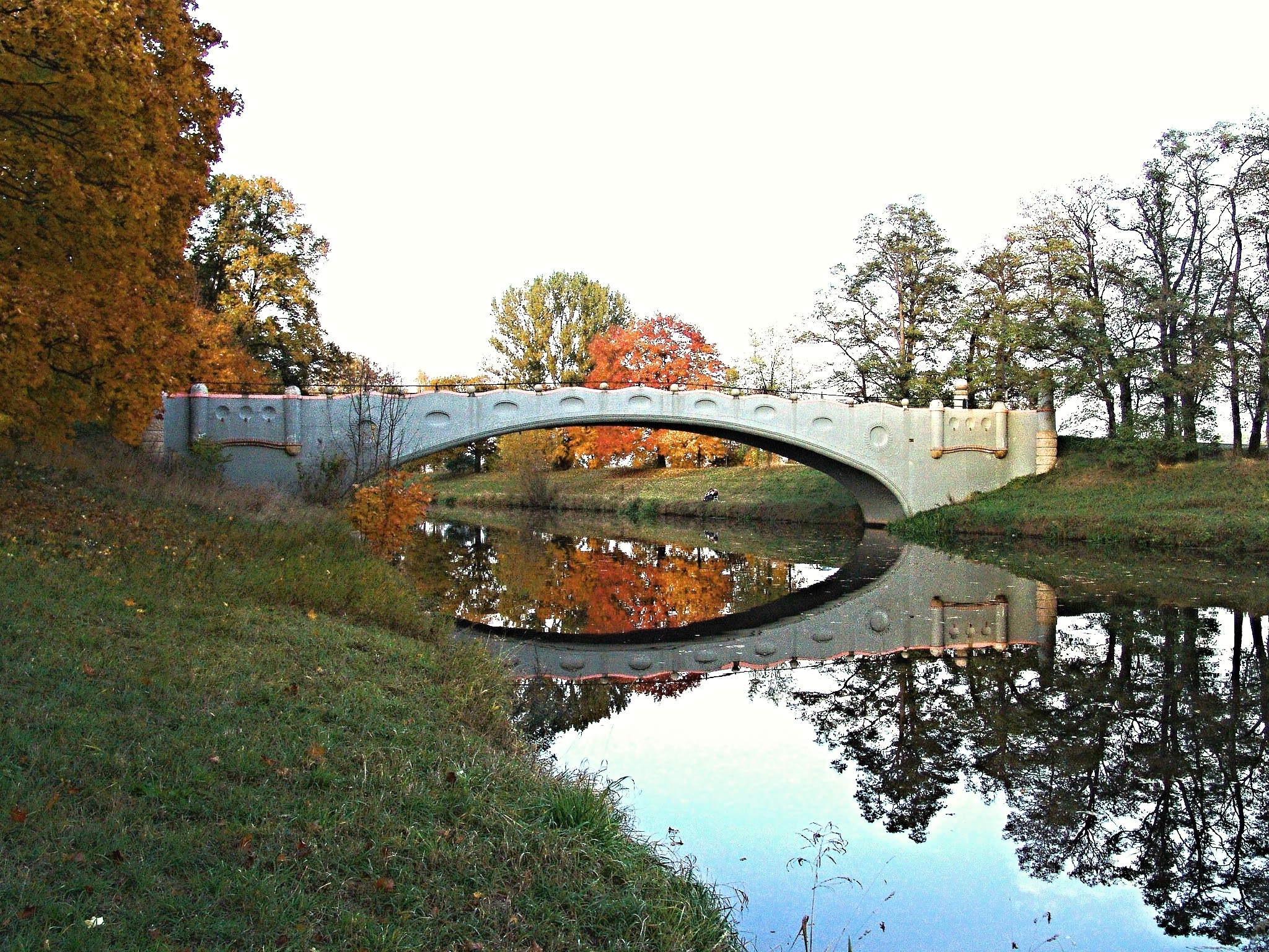 Most přes Labe, Plácky, Hradec Králové.